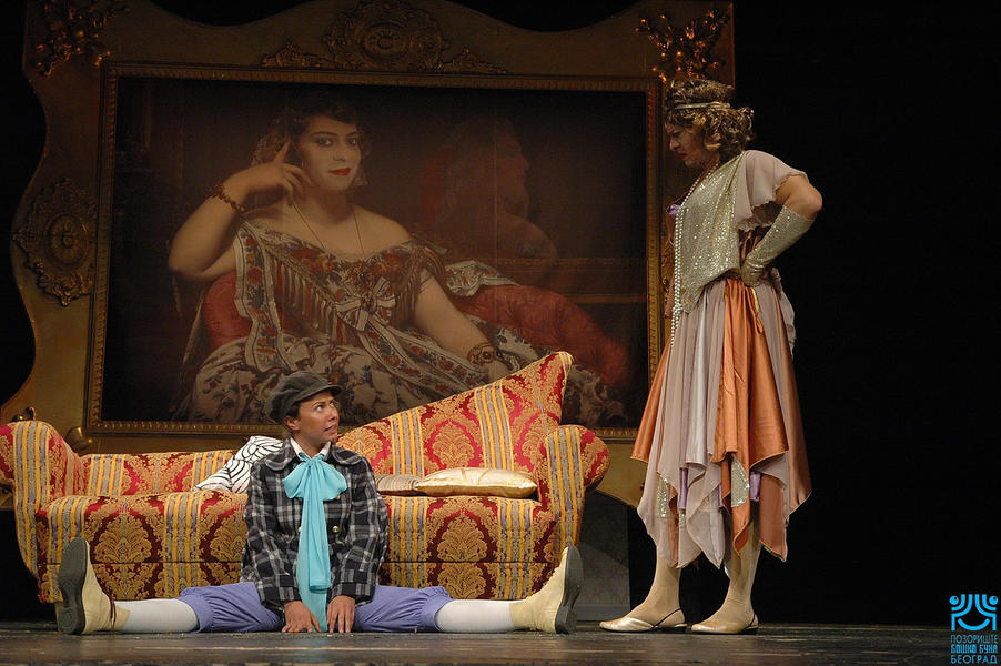 Српски (ћирилица): Сцене са премијере позоришне представе "Госпођа Министарка" у извођењу ансамбла позоришта Бошко Буха. На слици Горан Јевтић и Катарина Марковић.